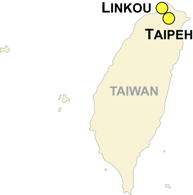 Austragungsorte der Futsal-WM 1996 in Spanien This map is the result from a map request to the Kartenwünsche in the Kartenwerkstatt. You can make a request for a new map to us as well.